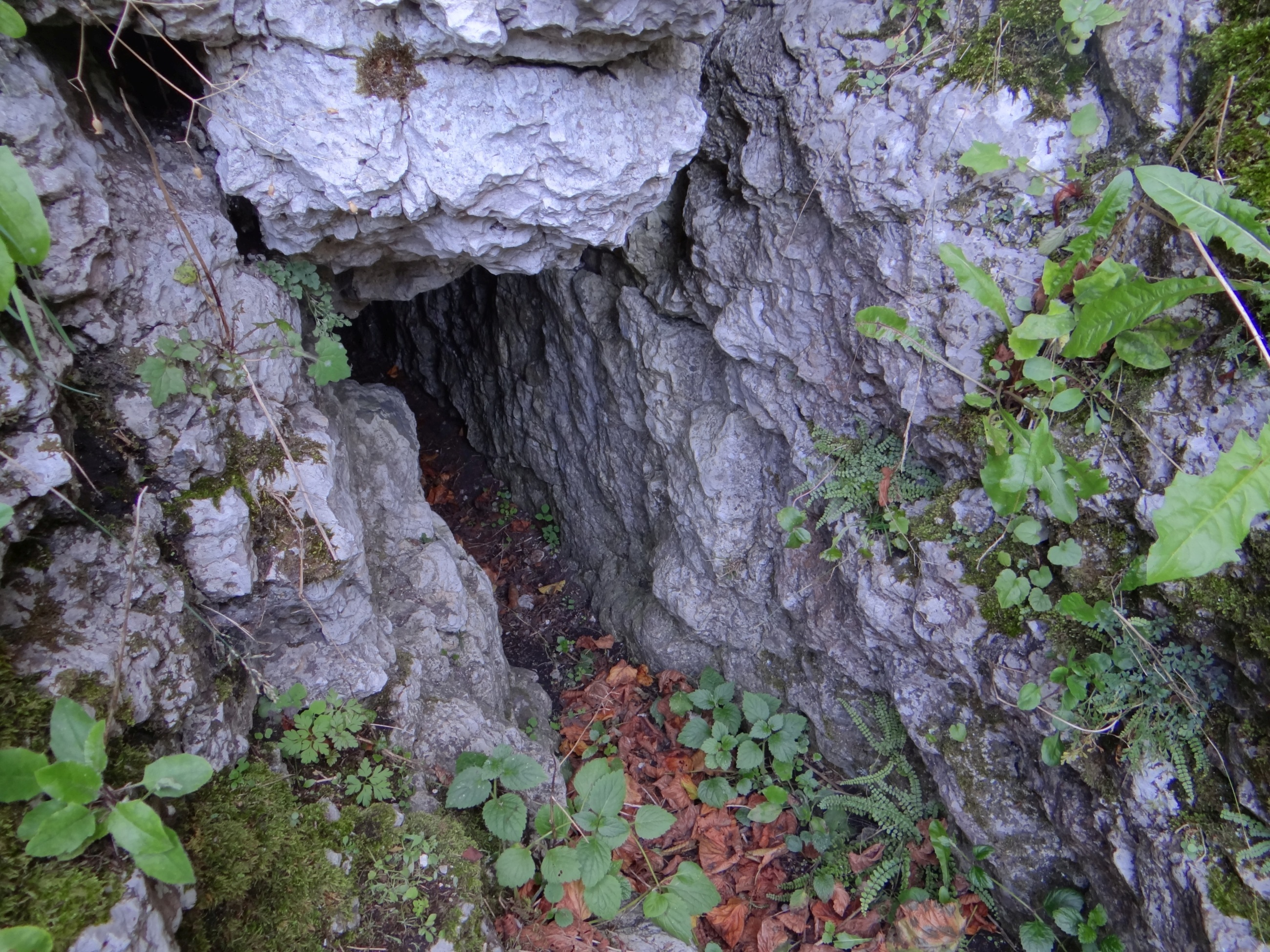 Szczelina za Igłą